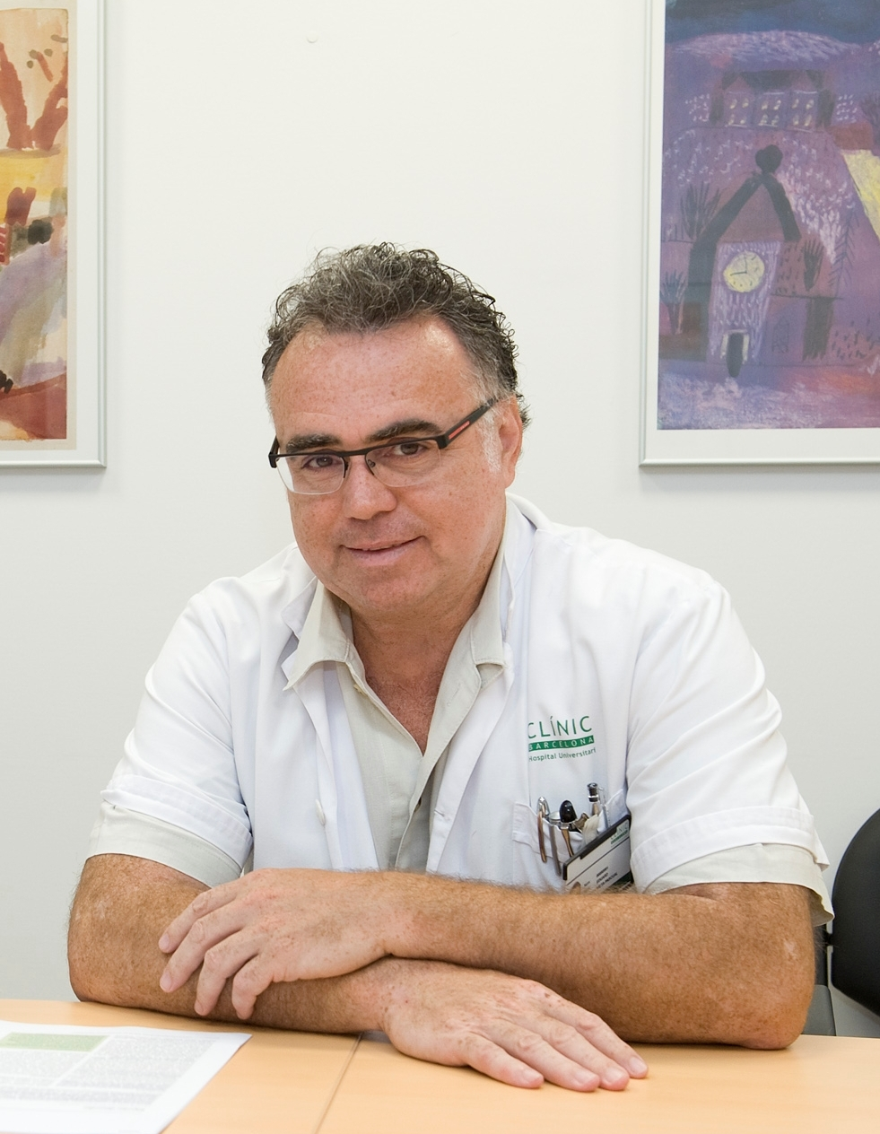 Eduard Vieta